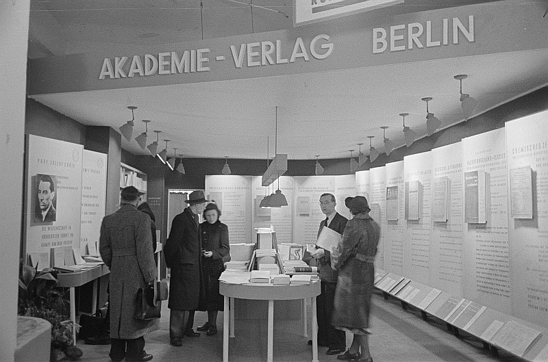 Original image description from the Deutsche Fotothek Messebesucher am Stand des Akademie-Verlags Berlin